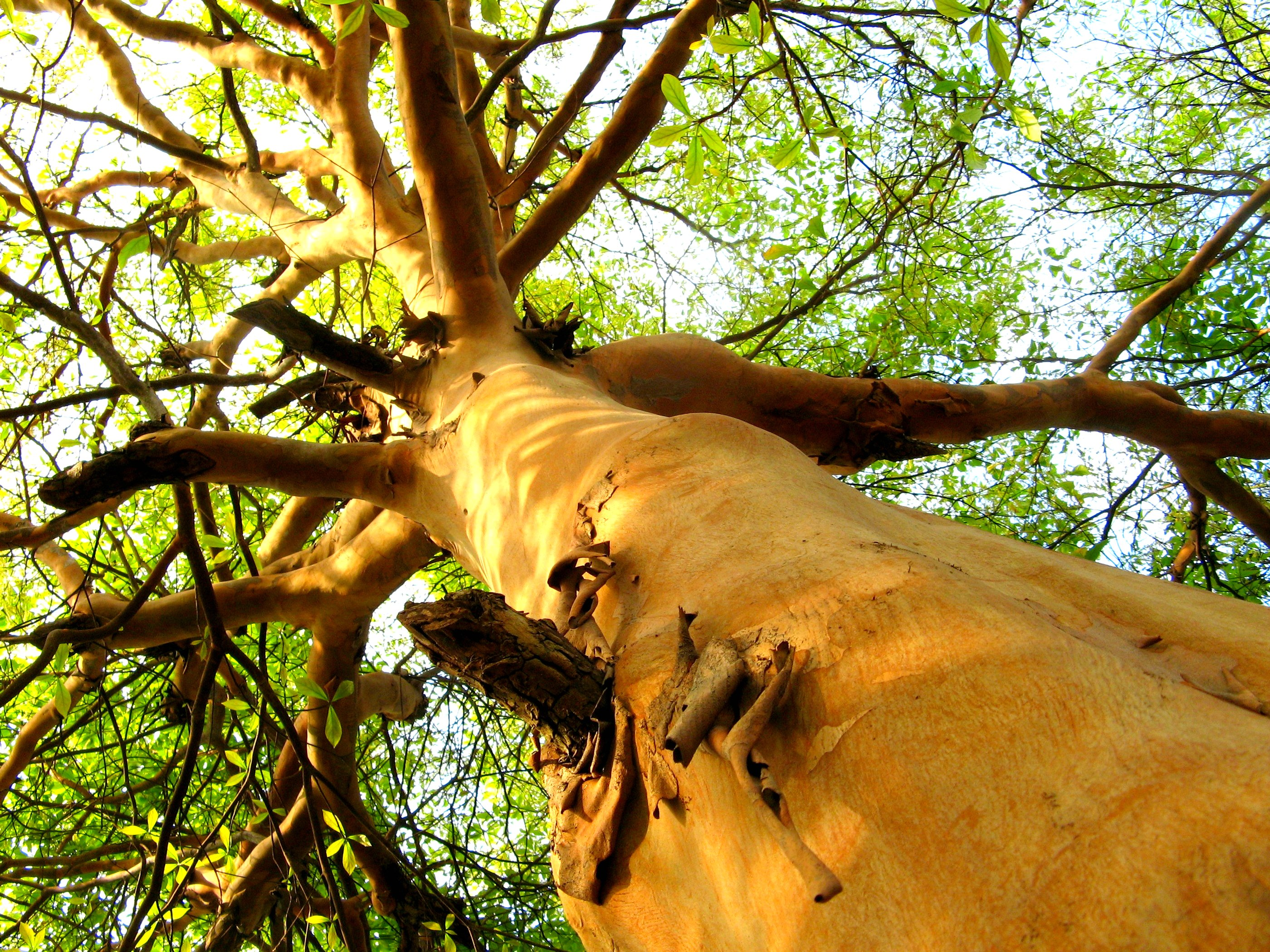 Araçá d´água (Terminalia kuhlmannii), Park Ceret, São Paulo